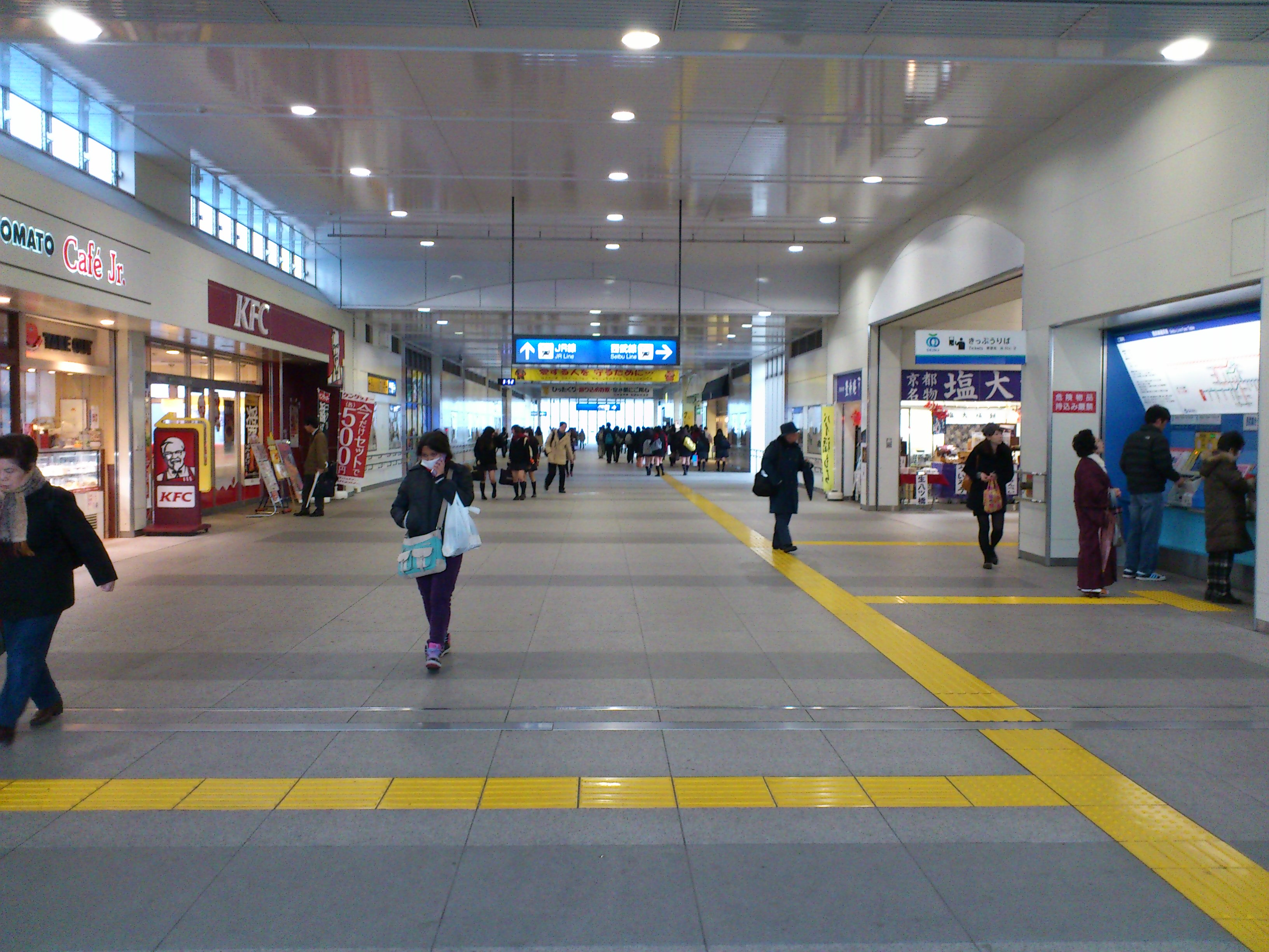 5 Chome-21 Mihorichō, Akishima-shi, Tōkyō-to 196-0001, Japan